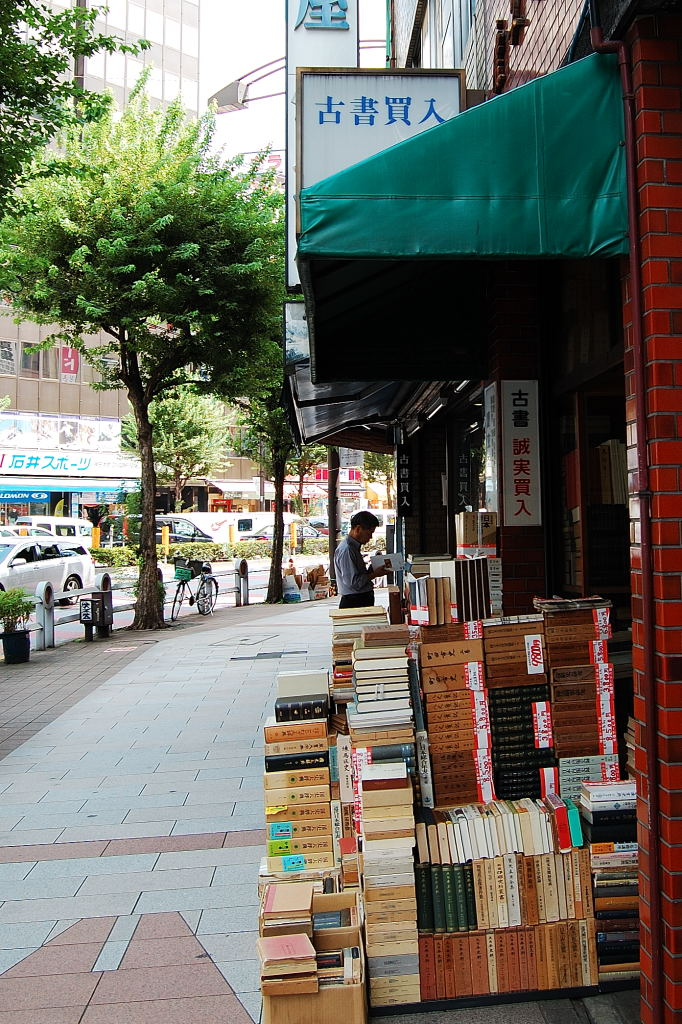 古書店（東京・千代田区神田神保町1-1付近、神保町駅最寄り）